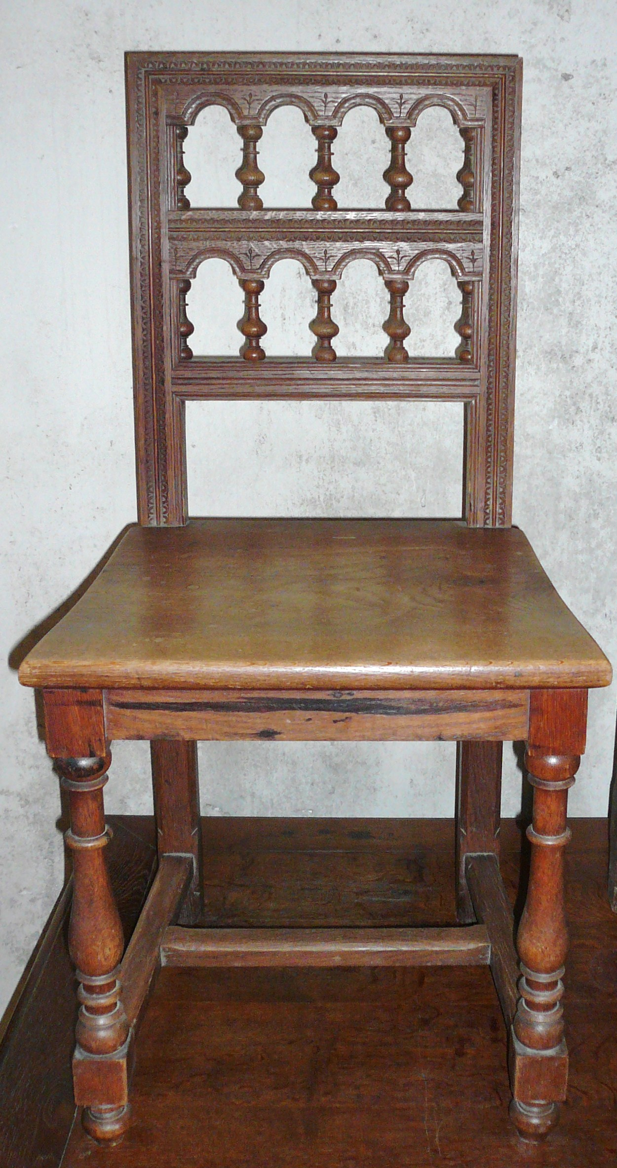 Une des chaises de style breton fabriquées par un ébéniste de Scaër pour les logements du personnel du château de Trévarez, Saint-Goazec, Finistère, Bretagne, France.